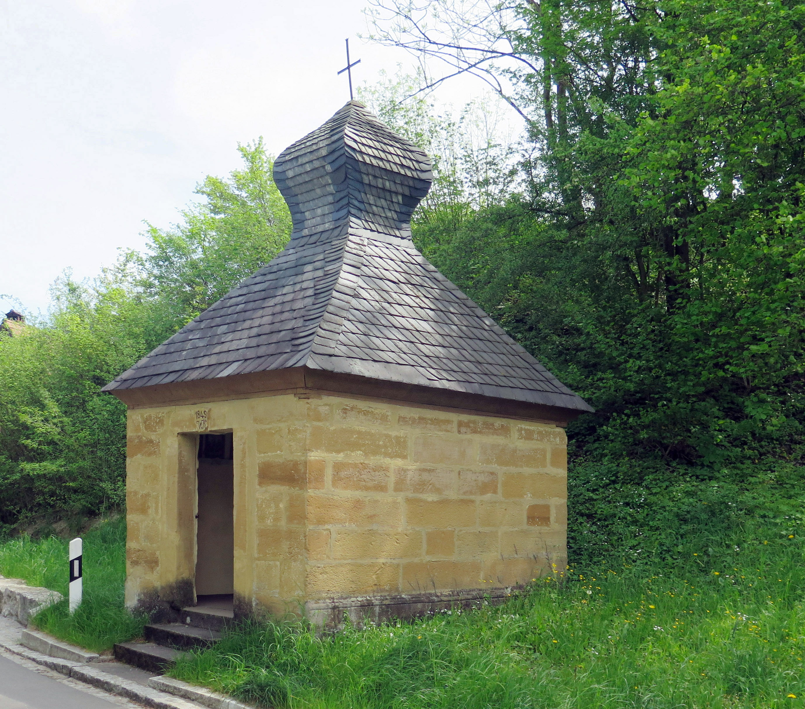 Wegkapelle in Sträublingshof, kleiner Sandsteinquaderbau mit vierseitiger Haube, bezeichnet „1849“; mit AusstattungThis is a photograph of an architectural monument.